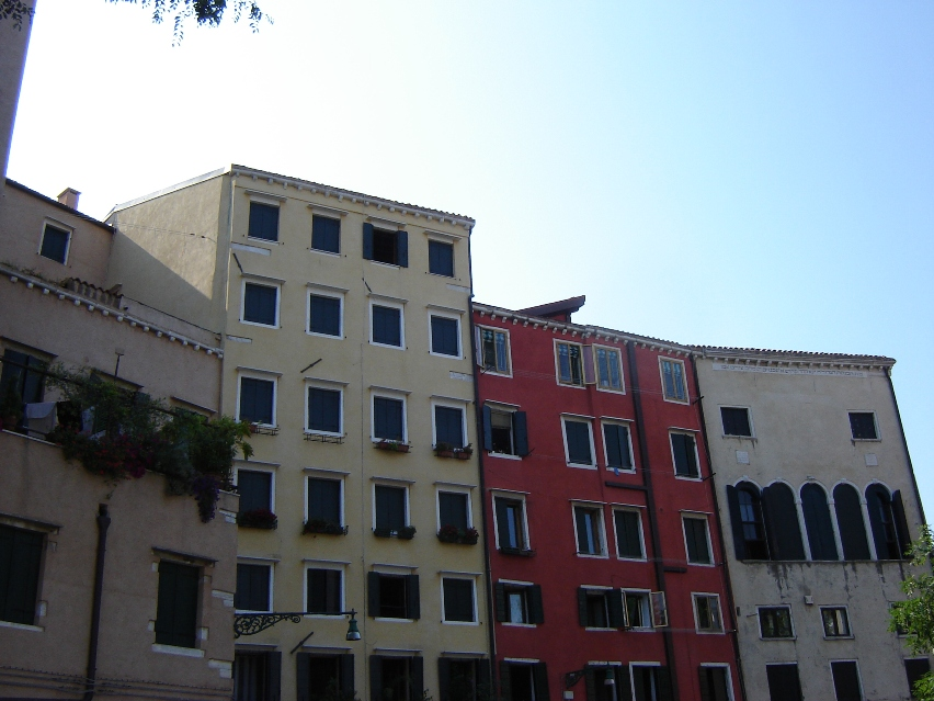 Ghetto di Venezia, Campo de Gheto Novo